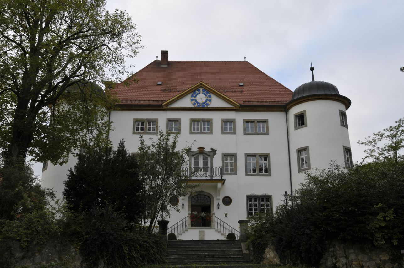 Schloss Reimlingen